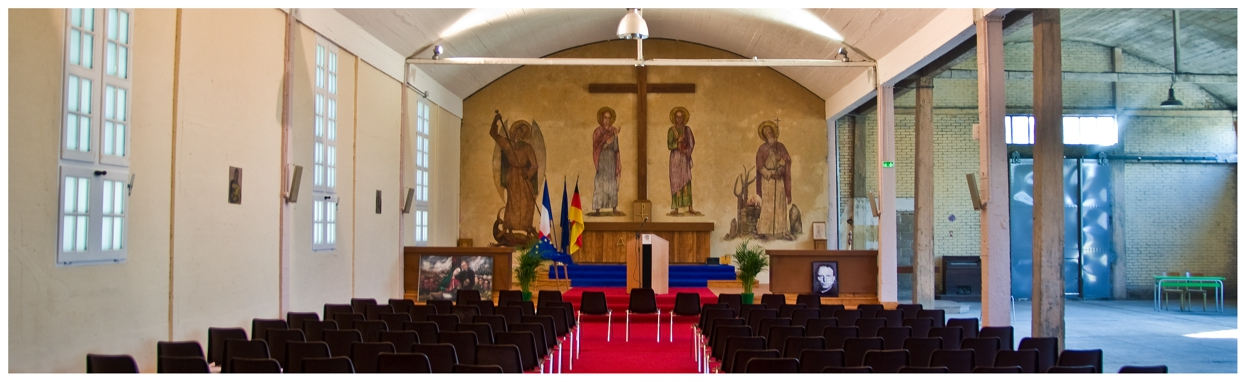 Voici la chapelle rénovée du séminaire des barbelés, le jour de son inauguration par l'ambassadeur d'Allemagne